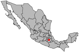 Locator map of Cholula, Puebla, Mexico